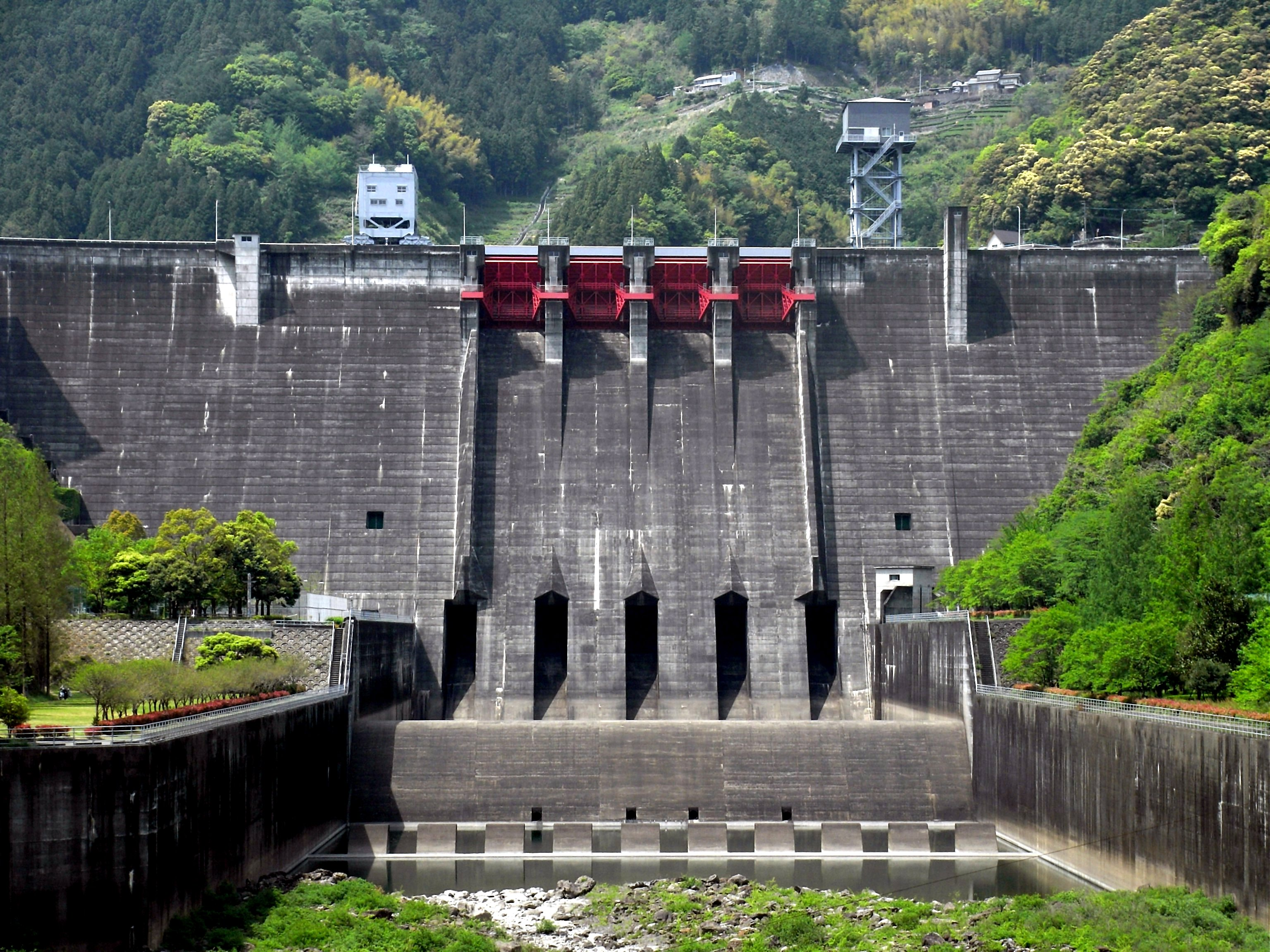 大渡ダム（高知県・仁淀川。国土交通省四国地方整備局管理）